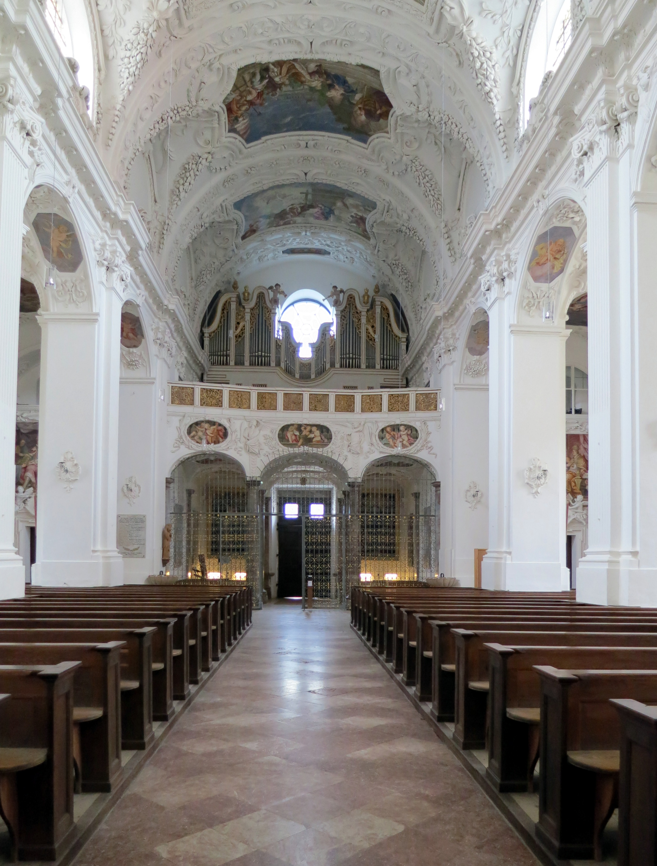 Ehemalige Klosterkirche im ehemaligen Kloster Tegernsee - heutige Kirche St. Quirinus